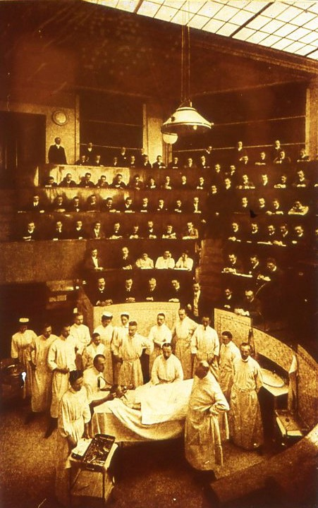 Friedrich Trendelenburg bei der Vorstellung eines chirurgischen Patienten im Hörsaal des Leipziger Jakobshospitals